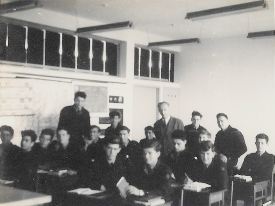 המורה לפיזיקה אברהם פריץ דוד עם מחזור ג 1958